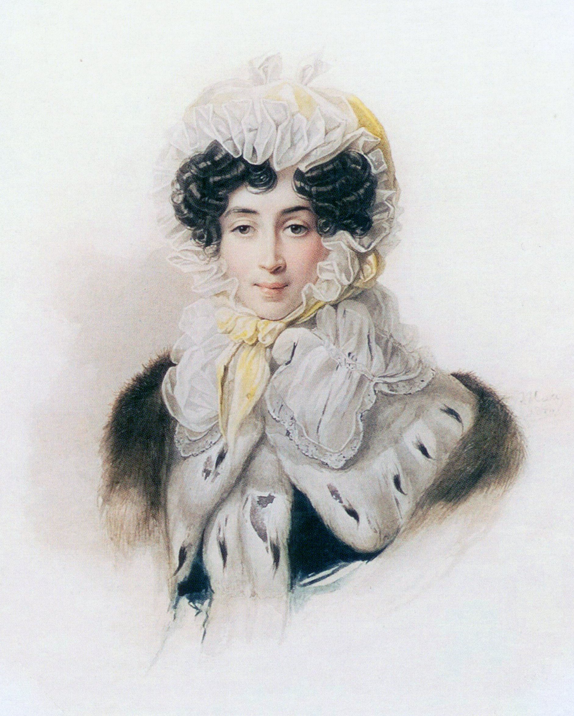 Софья Григорьевна Волконская (1786-1868), статс-дама